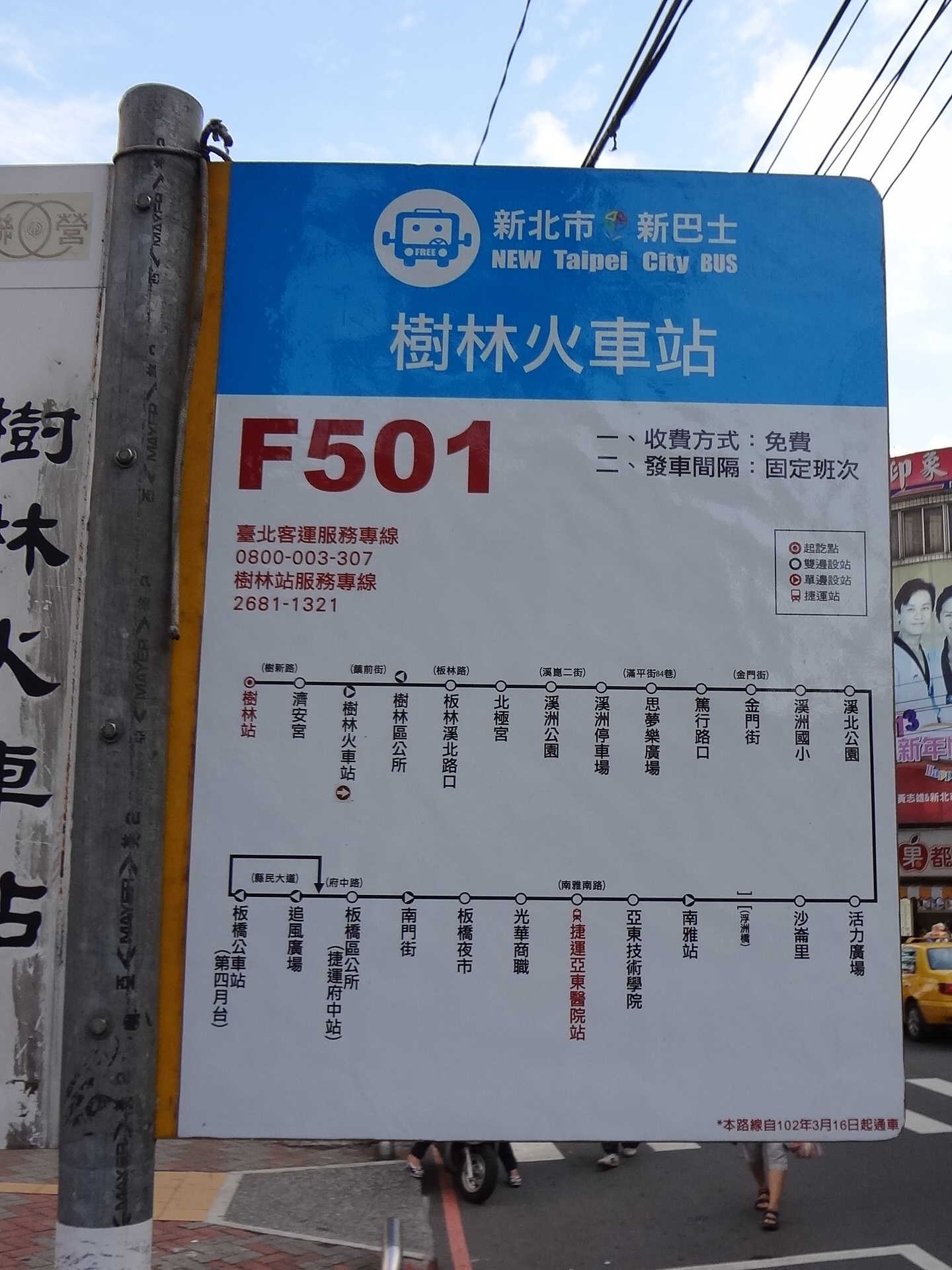 中文（台灣）: 新北市新巴士F501線「樹林火車站」站牌。